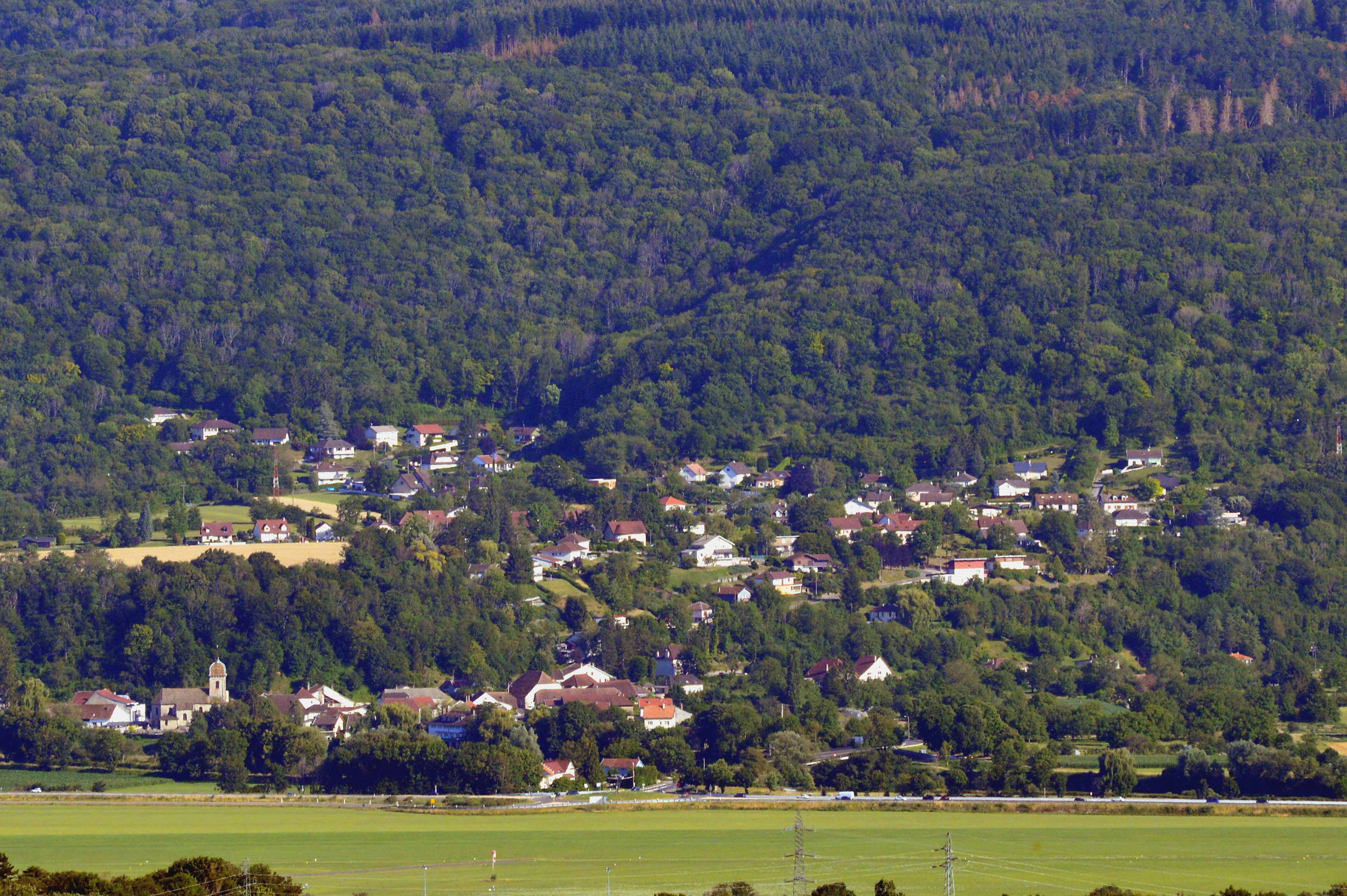 Le village de Chalèze vu depuis la colline de Chailluz.